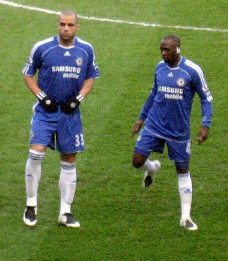 Alex with Claude Makélélé